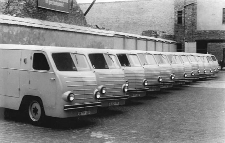 Zentralbild Funck 29.9.1953 Neue Fahrzeuge der Deutschen Post Im Postfuhramt in Berlin wurden 15 neue Spezial-Elektrowagen für den Briefkastenentleerungsdienst gezeigt, die am 1.10.53 von der Oberpostdirektion in Betrieb genommen werden. Die Wagen - eine Konstruktion von Ingenieur Rebbel- wurden bei IFA-Werdau gebaut und dienen vor allem dem Schutz des Fahrers, der nur nach rechts aussteigen kann und auch vor Witterungseinflüssen geschützt ist.